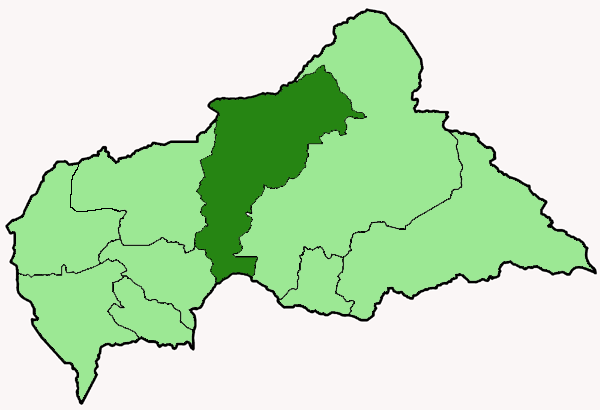 Mappa della diocesi cattolica di Kaga-Bandoro, nella Repubblica Centrafricana. Anno 2009.